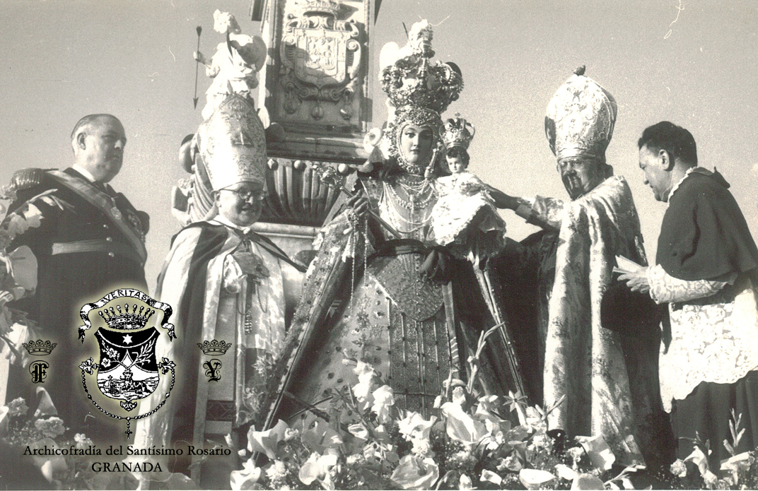 Coronacion Rosario Granada 14-5-1961